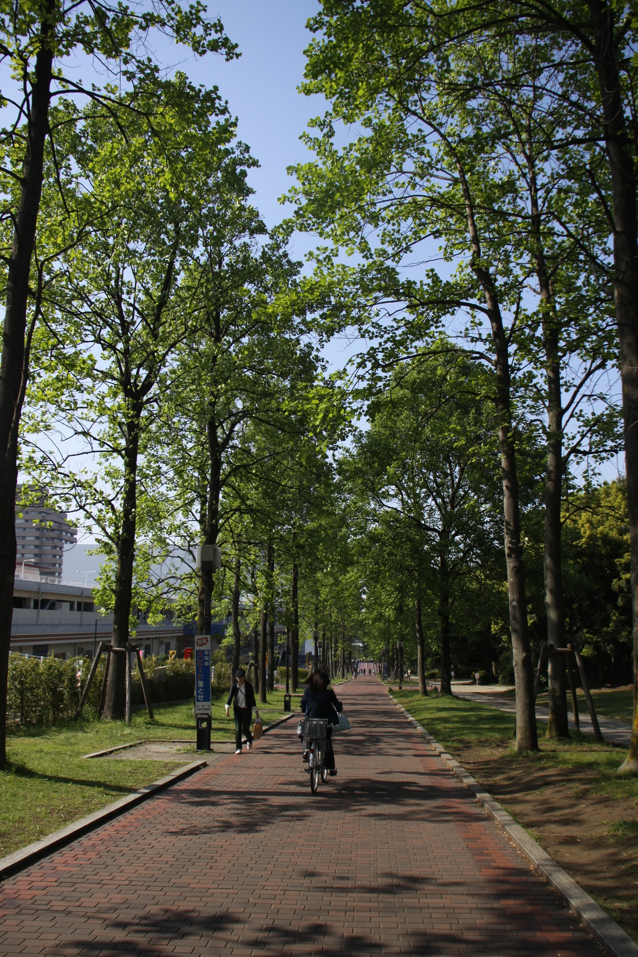 レンガ坂（多摩市）